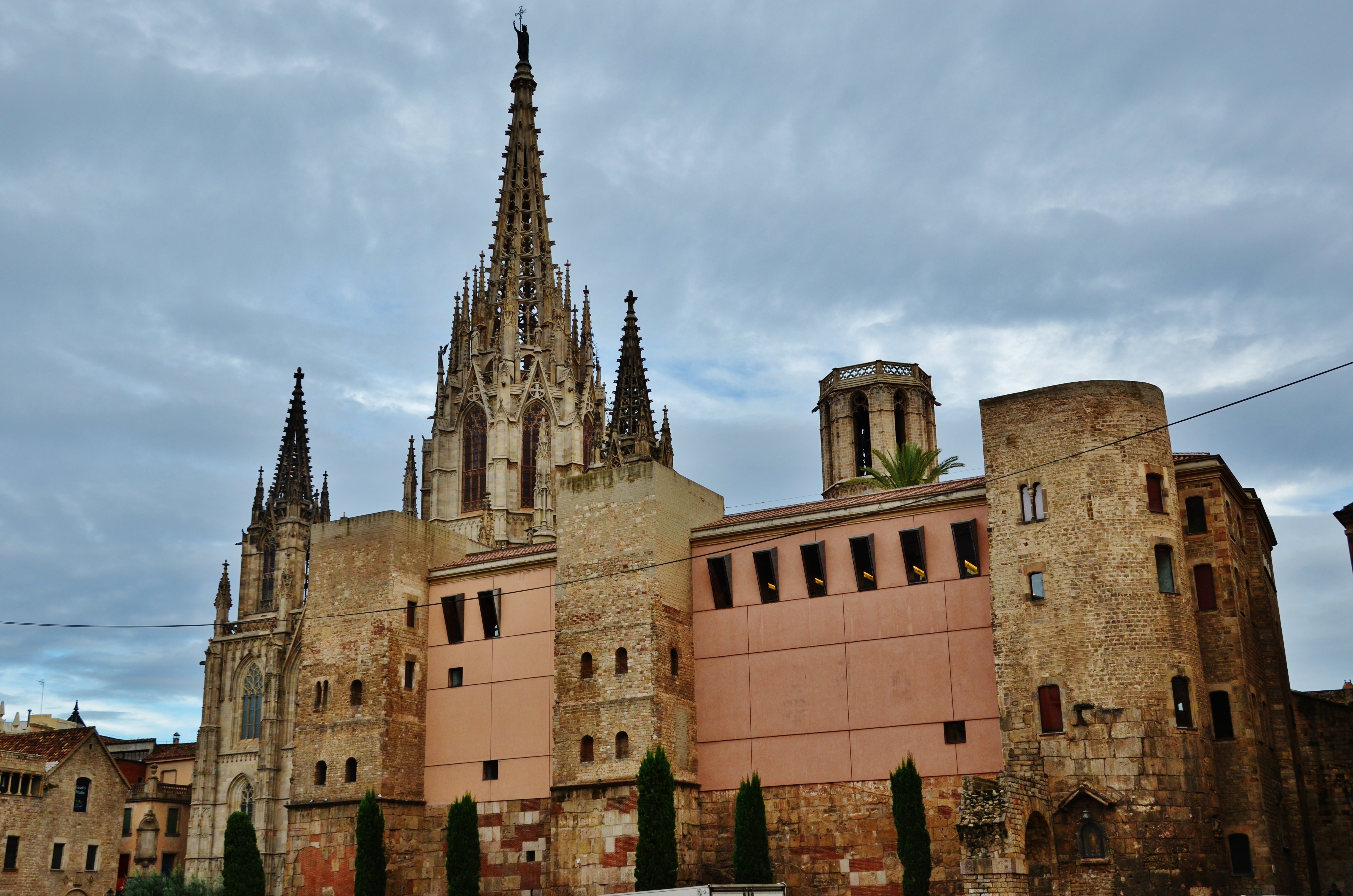 Casa de l'Ardiaca, Barri Gòtic, Barcelona